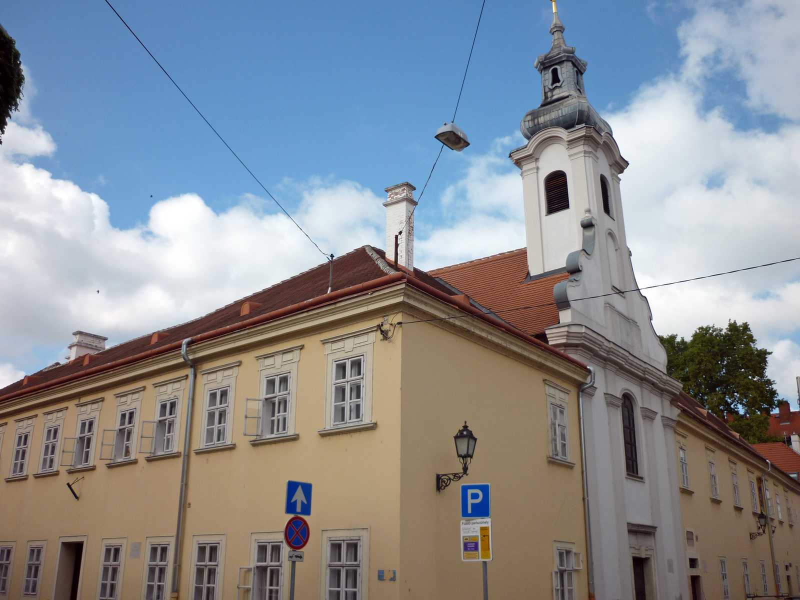 Német ispita (Győr, Vörösmarty Mihály utca 6., Apáca utca 27-31.) This is a photo of a monument in Hungary. Identifier: 4408